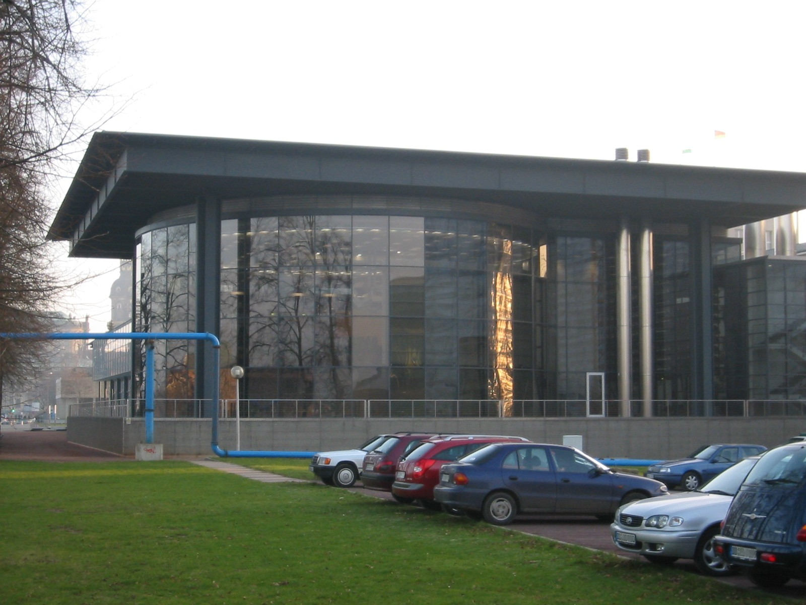 Außenansicht vom Plenum des Landtag Sachsen